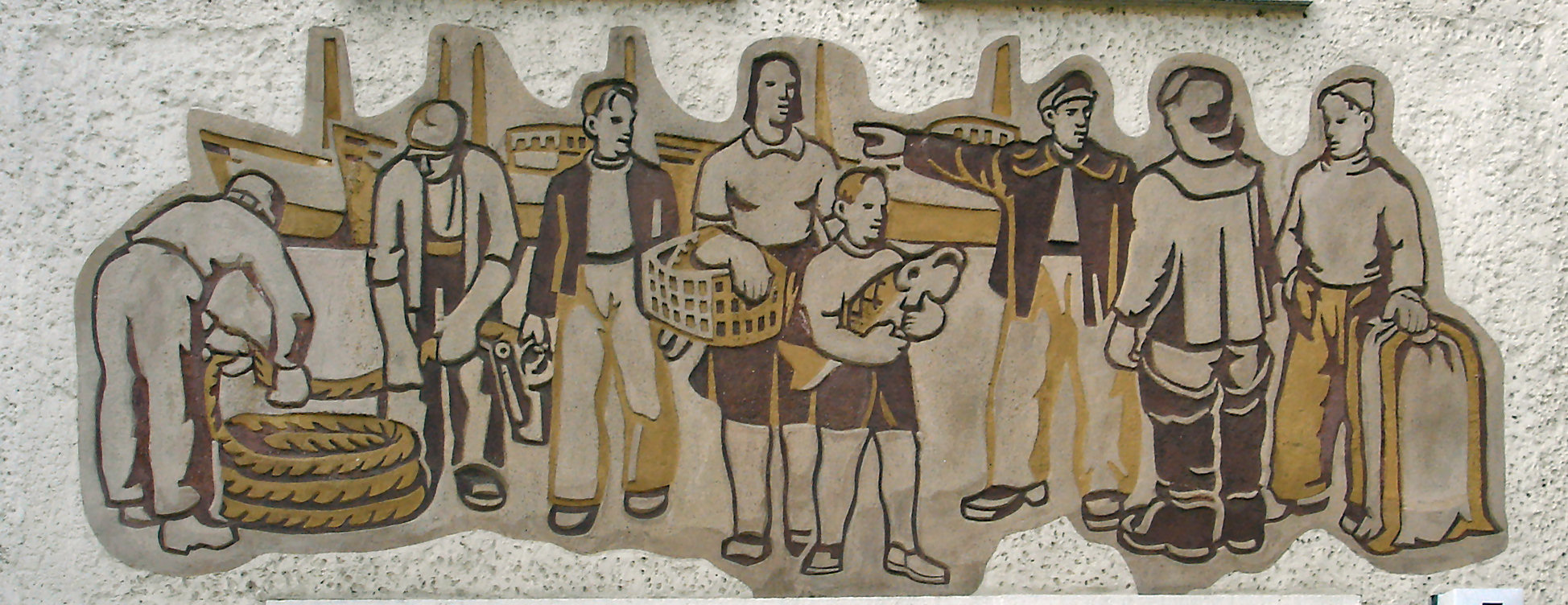 Scrafitto "Szenen aus dem Arbeitsleben - 1" von Heinz Becker in Rostock / Scrafitto "Scenes from Working Life - 1" of Heinz Becker in Rostock